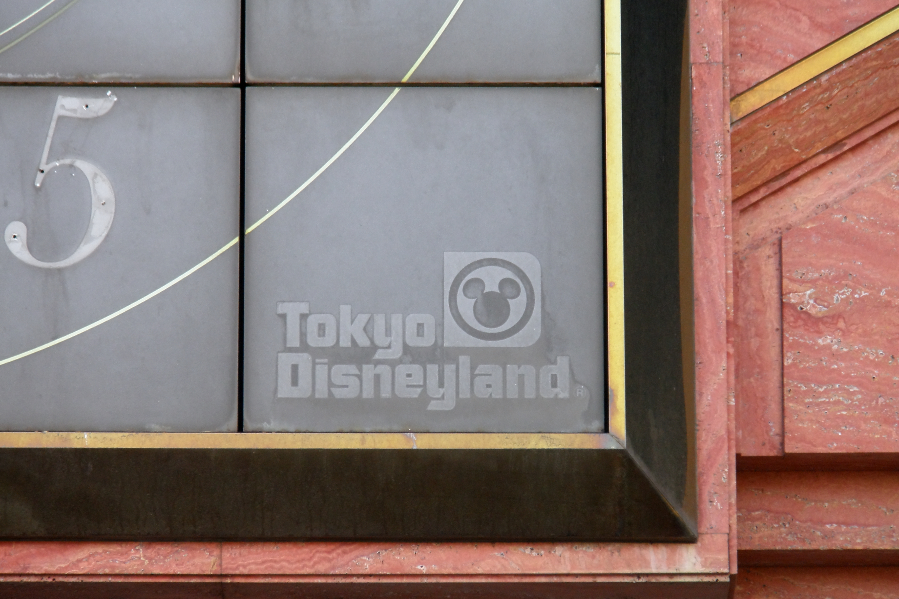 旧茂原そごうにて。